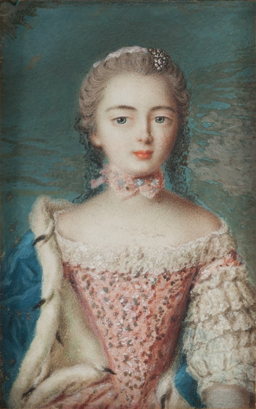 Charlotte-Godefride-Elisabeth de Rohan